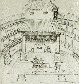 15:57, 5 февруари 2007 (UTC)